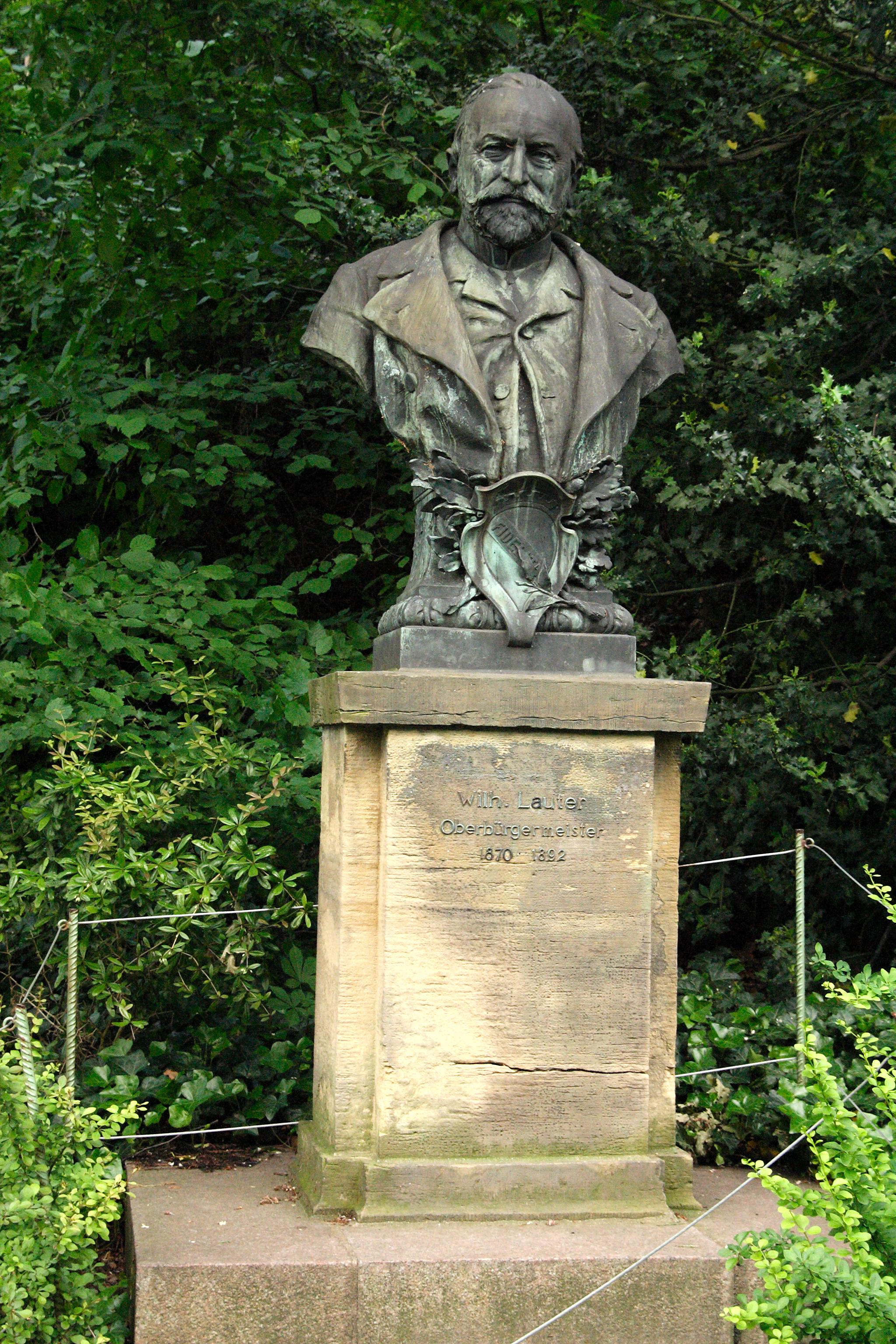 Büste des ehemaligen Karlsruher Oberbürgermeisters Wilhelm Florentin Lauter im Stadtgarten Karlsruhe, am Fuße des nach ihm benannten Lauterbergs. Inschrift auf dem Sockel: Wilh. Lauter // Oberbürgermeister // 1870 1892 (der Strich zwischen den Zahlen fehlt). Schöpfer der Büste ist der Karlsruher Bildhauer Hermann Volz.